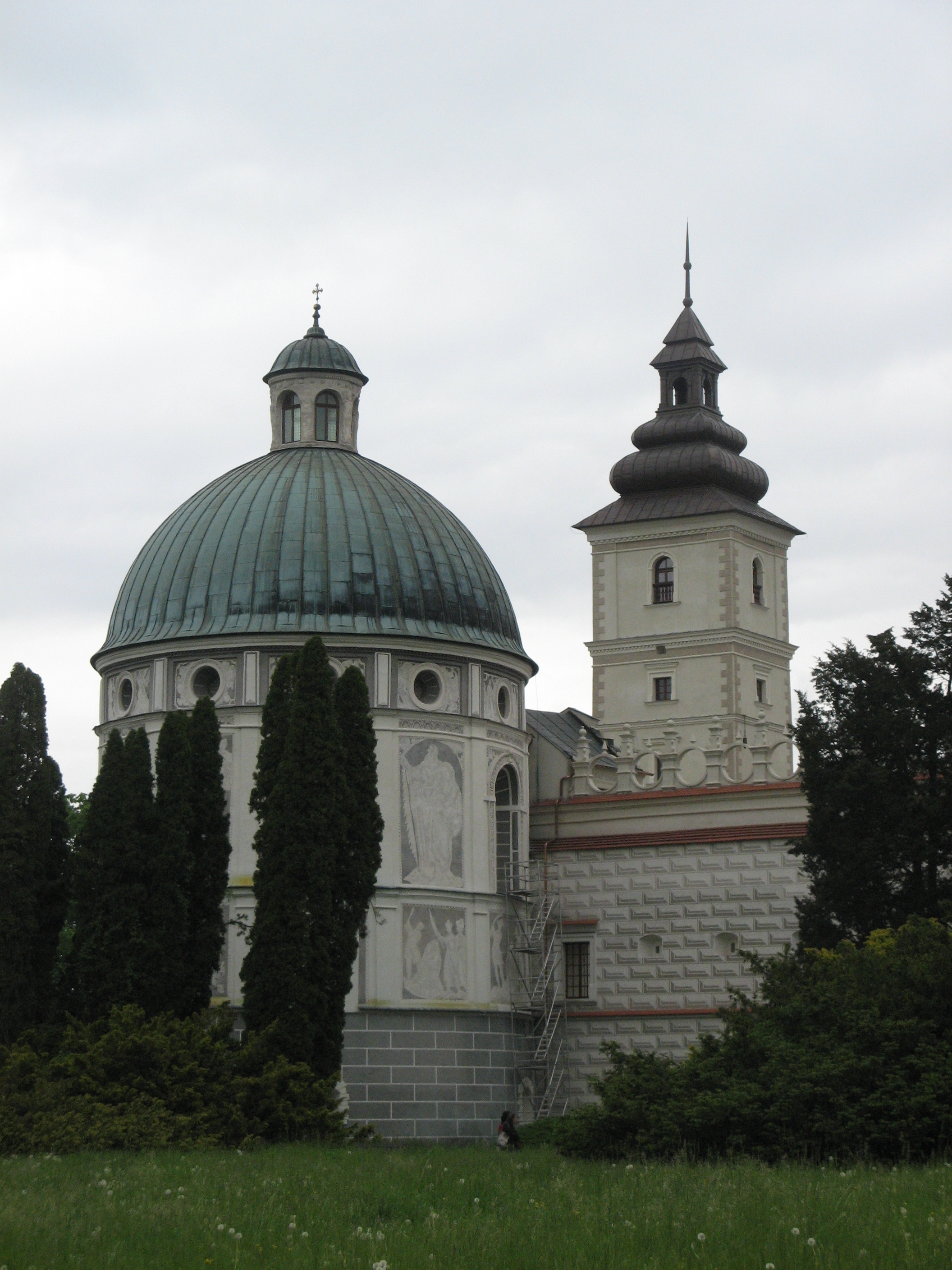 Kaplica na zamku w Krasiczynie.